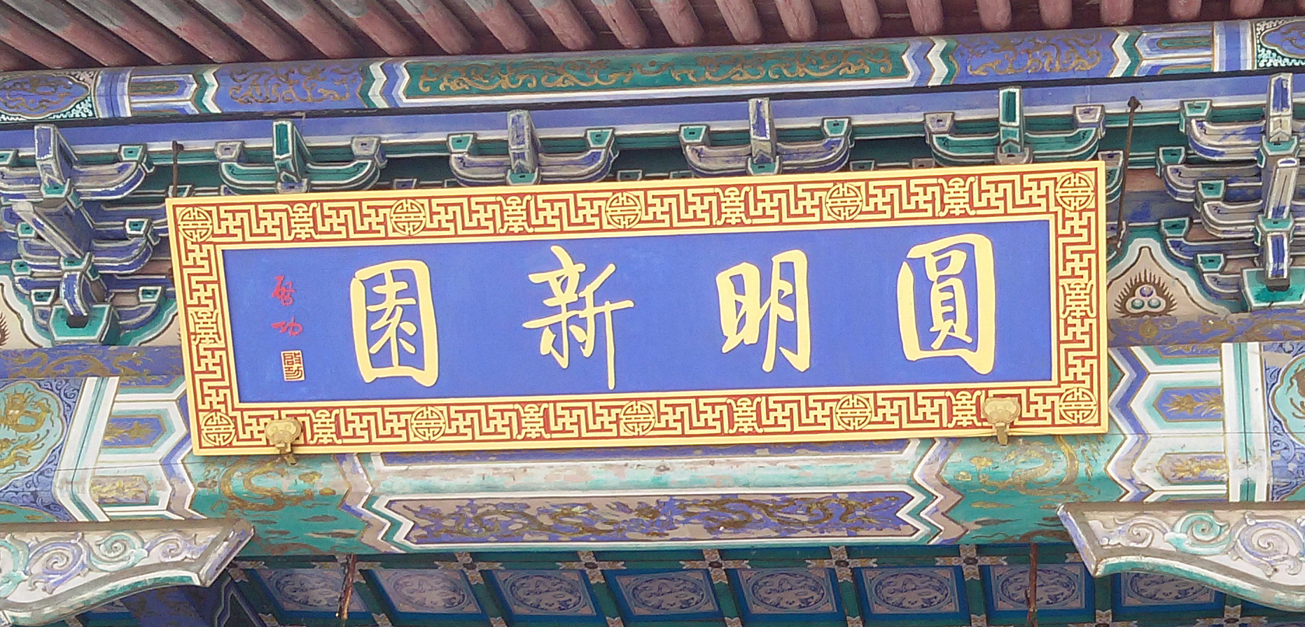 粵語: 圓明新園正門頭頂嘅牌啲字